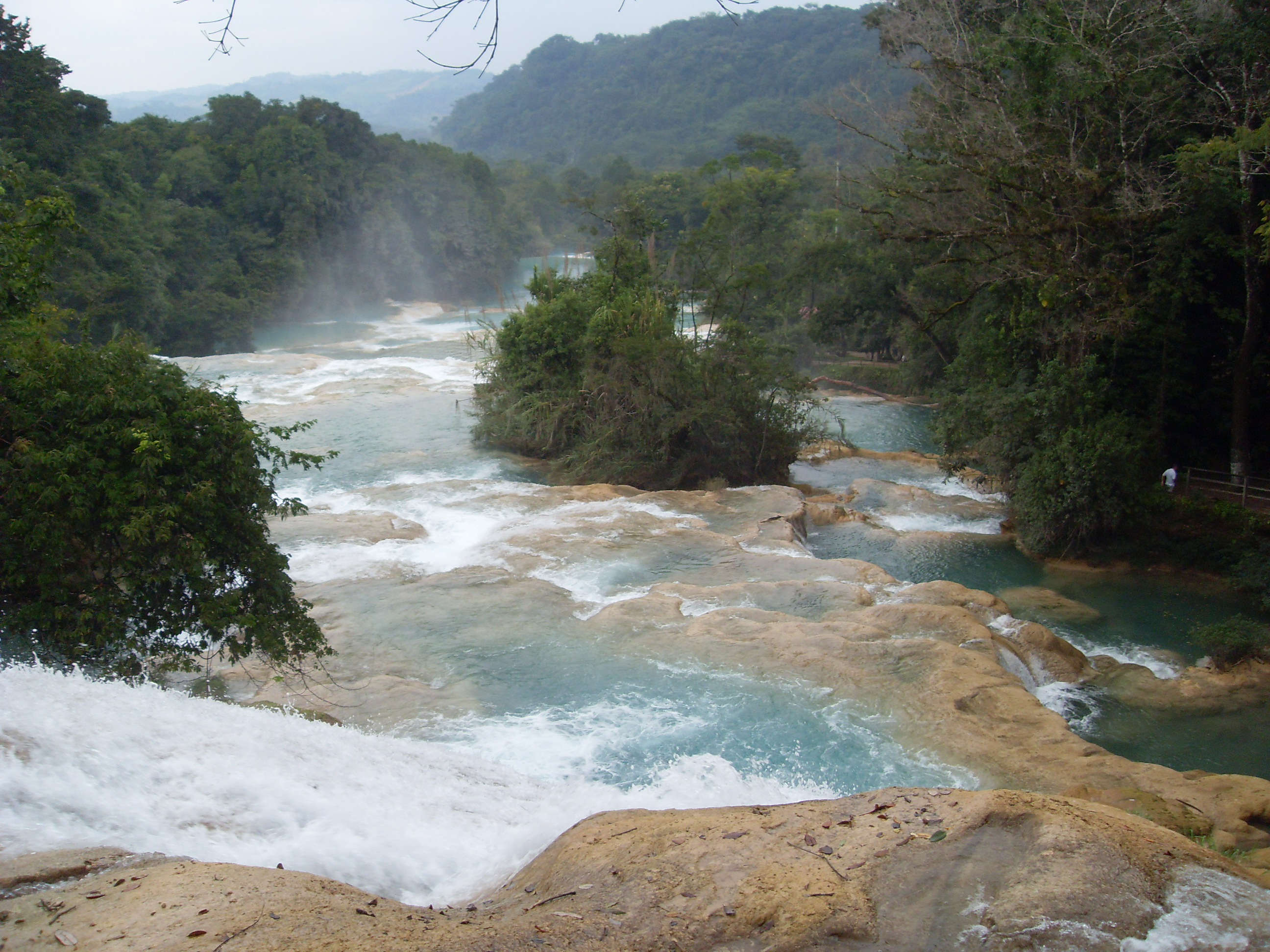 Wodospad Agua azul w stanie Chiapas w Meksyku